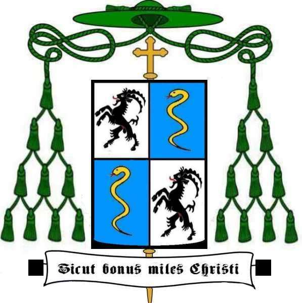 Wappen Georgius Schmid von Grüneck Bischof von Chur 1908-1932